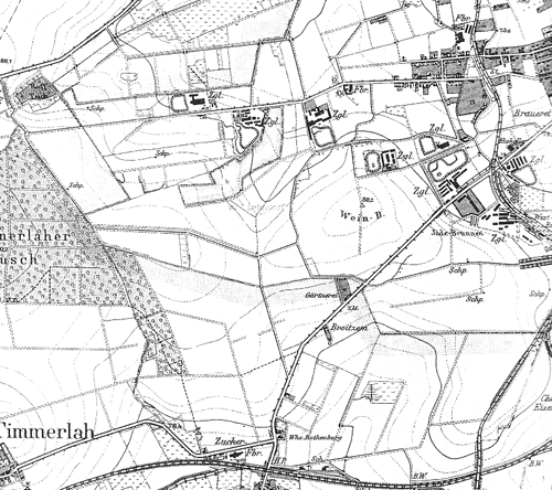 Braunschweig-Weststadt - Das Gebiet der Weststadt um 1899. Zu erkennen: U.a. der Raffteich, der Jödebrunnen, der Weinberg, die Broitzemer Straße, der Timmerlaher Busch und das Wirtshaus Rothenburg